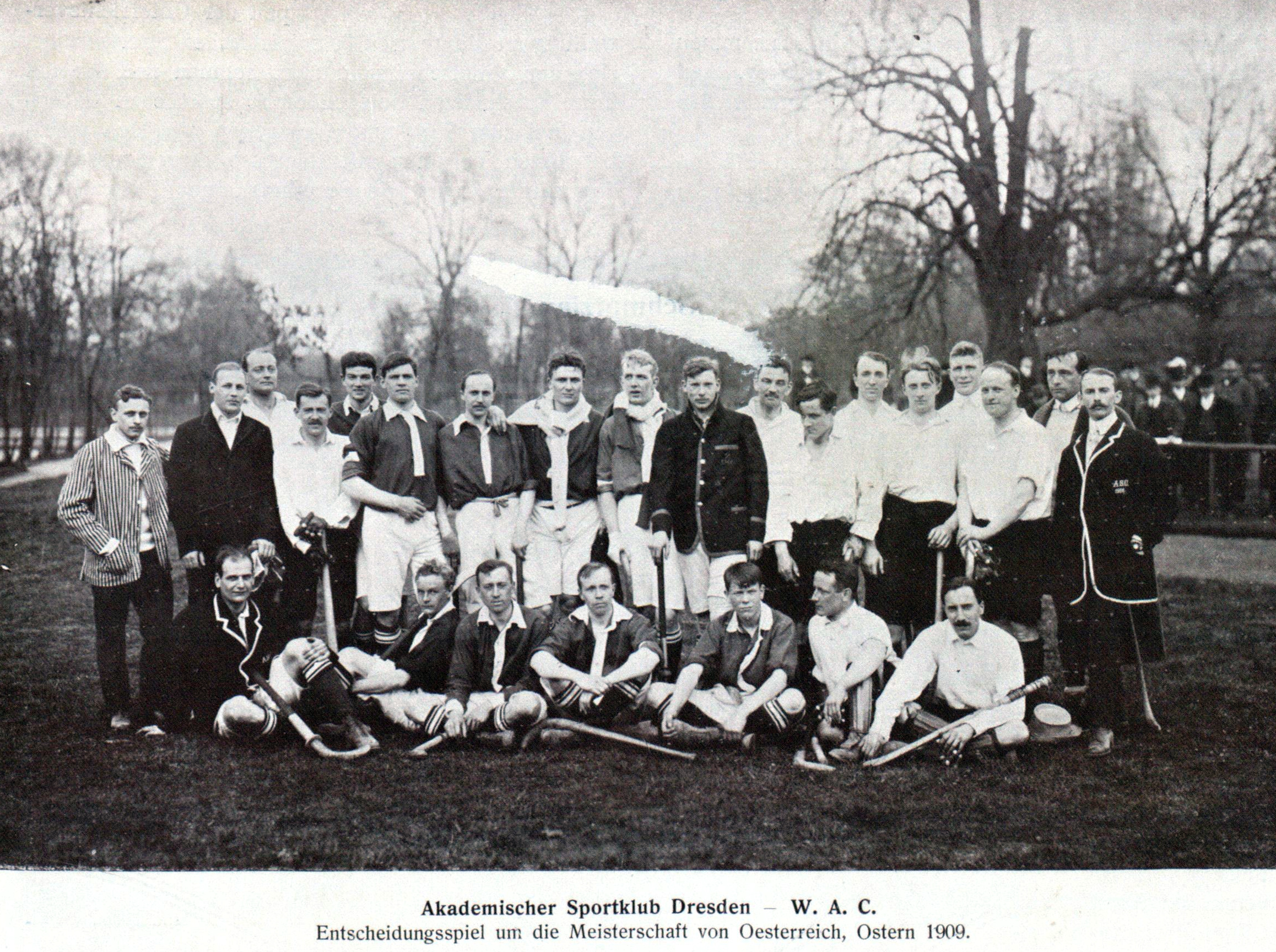 Akademischer Sportklub Dresden - W. A. C.; Entscheidungsspiel um die Meisterschaft von Oesterreich, Ostern 1909.